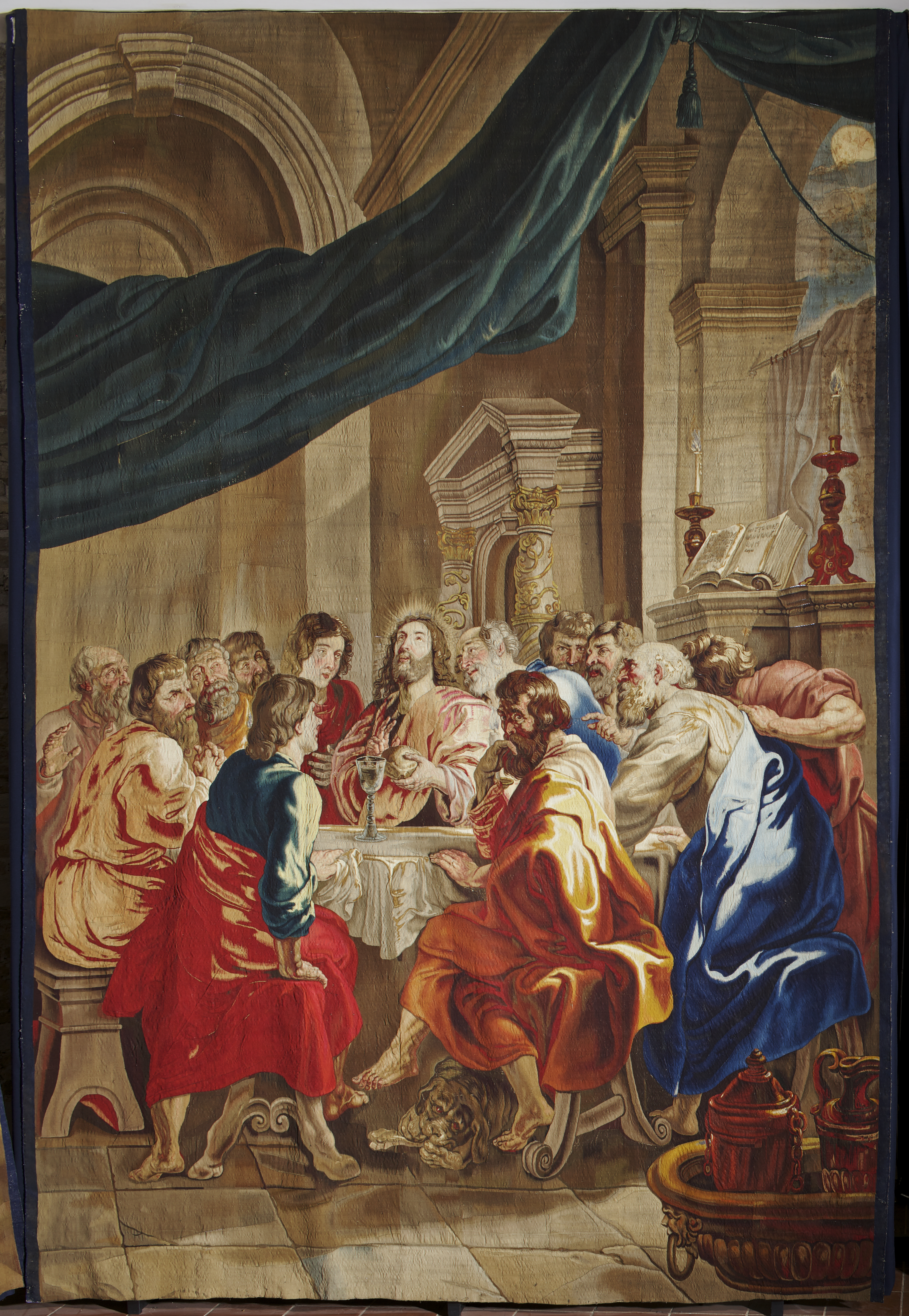 Manifattura Fiamminga, 1630-1650 ca., arazzo su disegno di Rubens, 505x350 cm, Ancona Museo Diocesano.